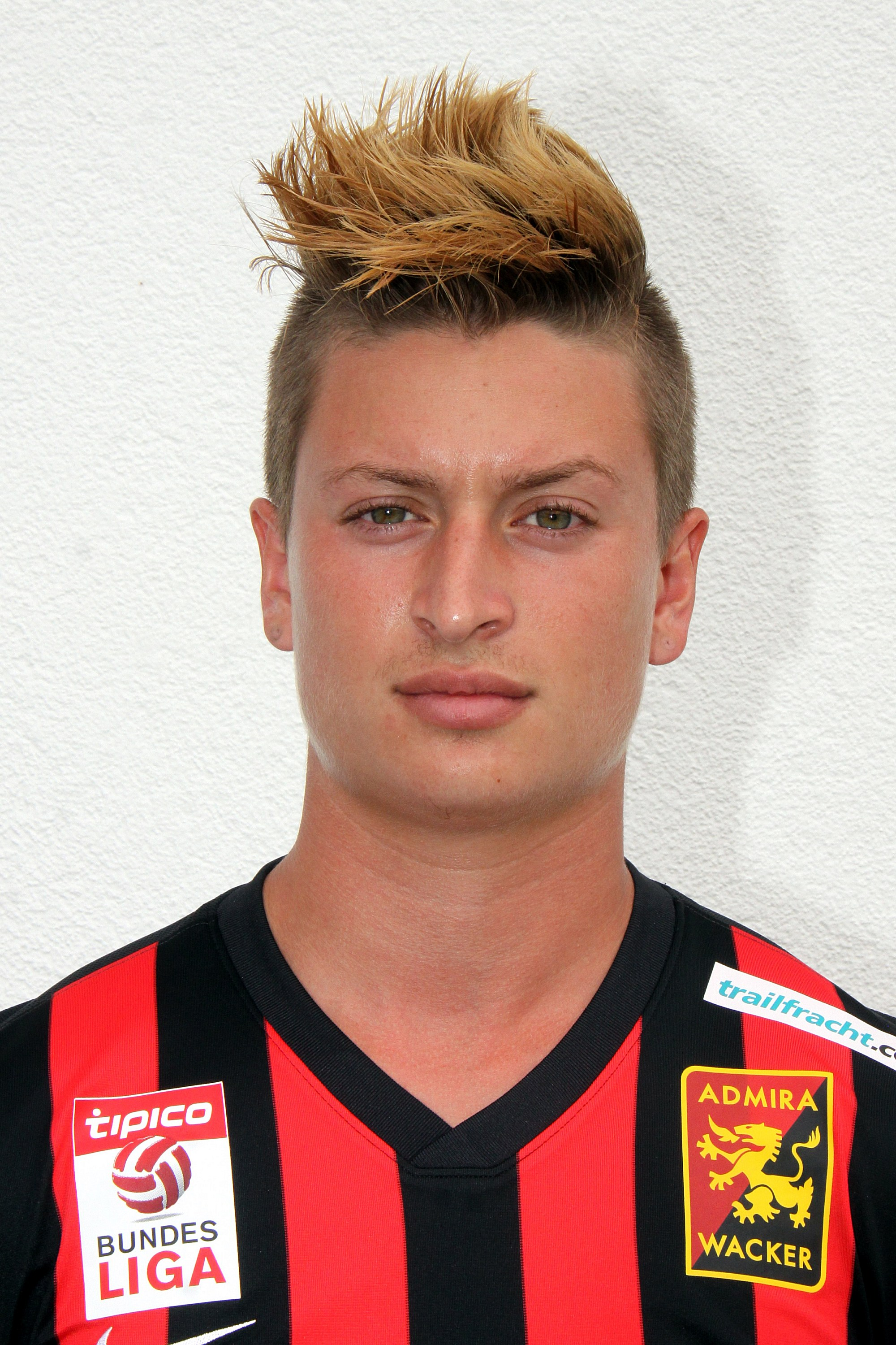 Oliver Pranjic, FC Admira Wacker Mödling 2015-2016, Rückennummer 94